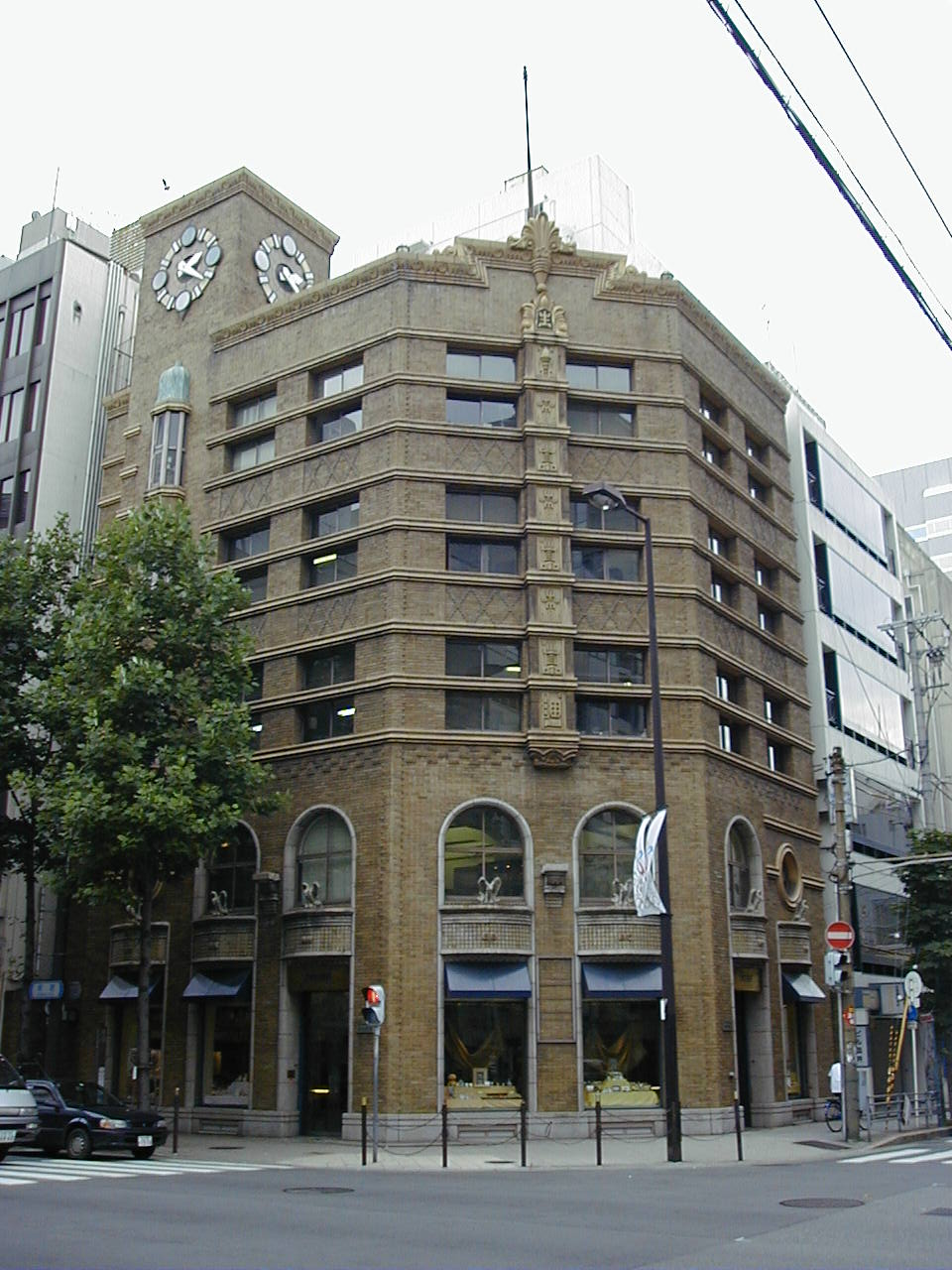 生駒時計店（大阪市、1914年、設計：宗兵蔵）